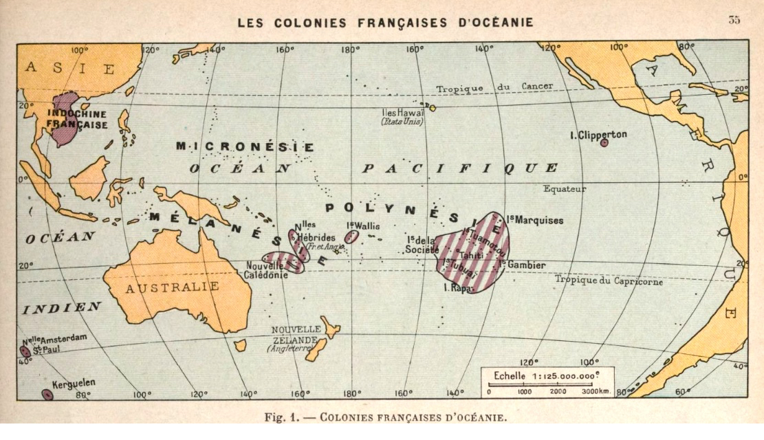 Géographie : cours supérieur 1re année certificat d'études / L. Gallouédec, F. Maurette, J. Martin, éd. Hachette, 1938, p. 35. (domaine public)